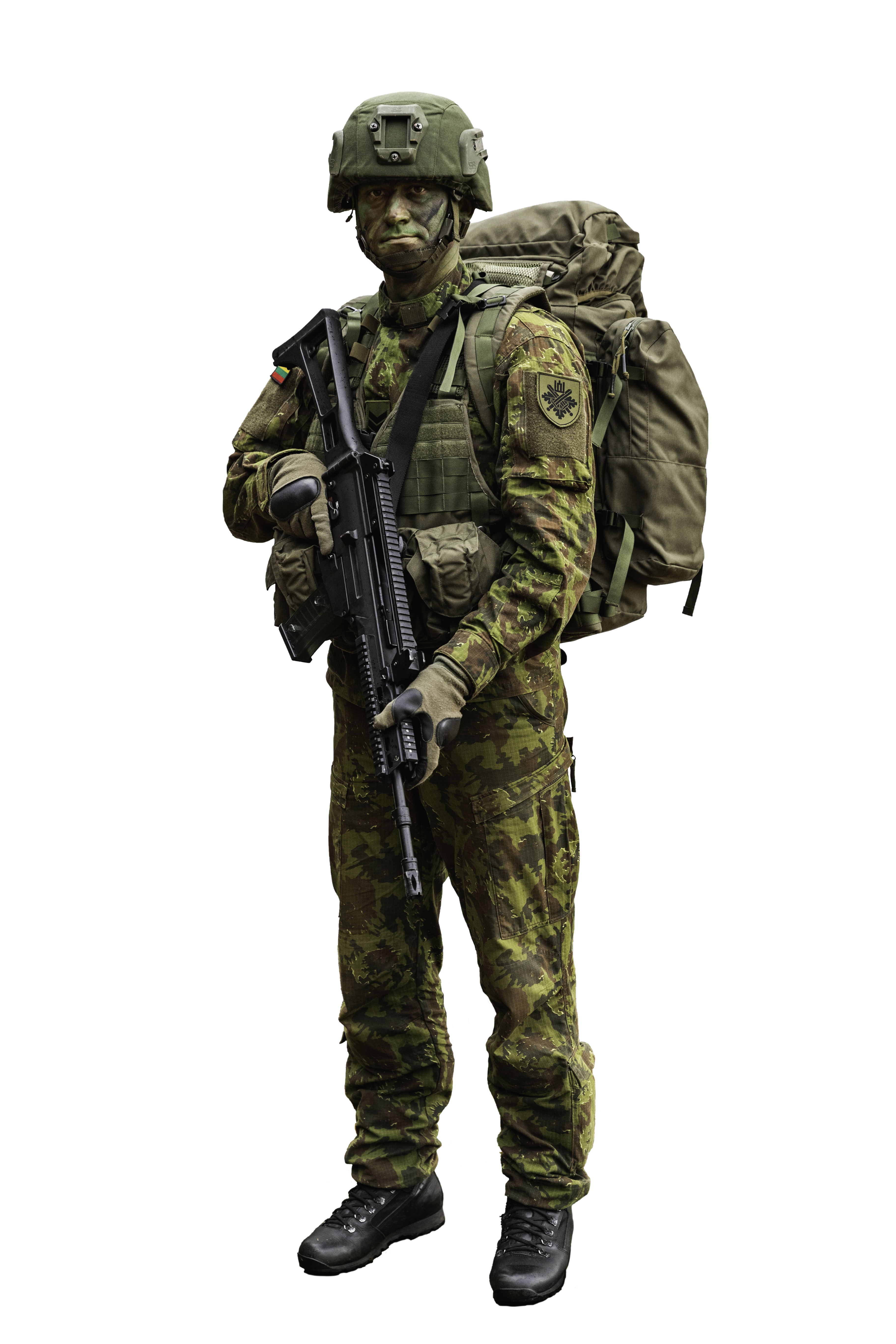 Šiuolaikinis Krašto apsaugos savanorių pajėgose tarnaujantis karys